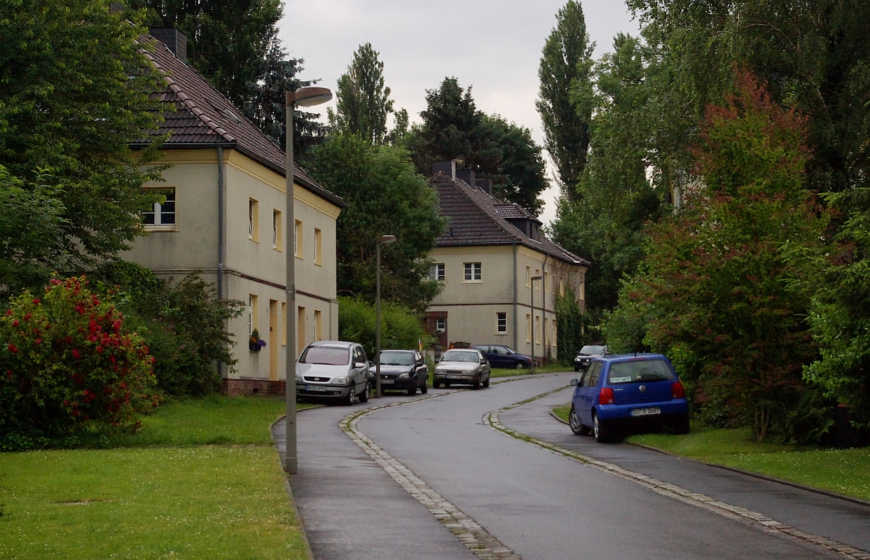 Bergbaubeamtensiedlung "Am Knie" in Dortmund-Neuasseln This is a photograph of an architectural monument. 0002